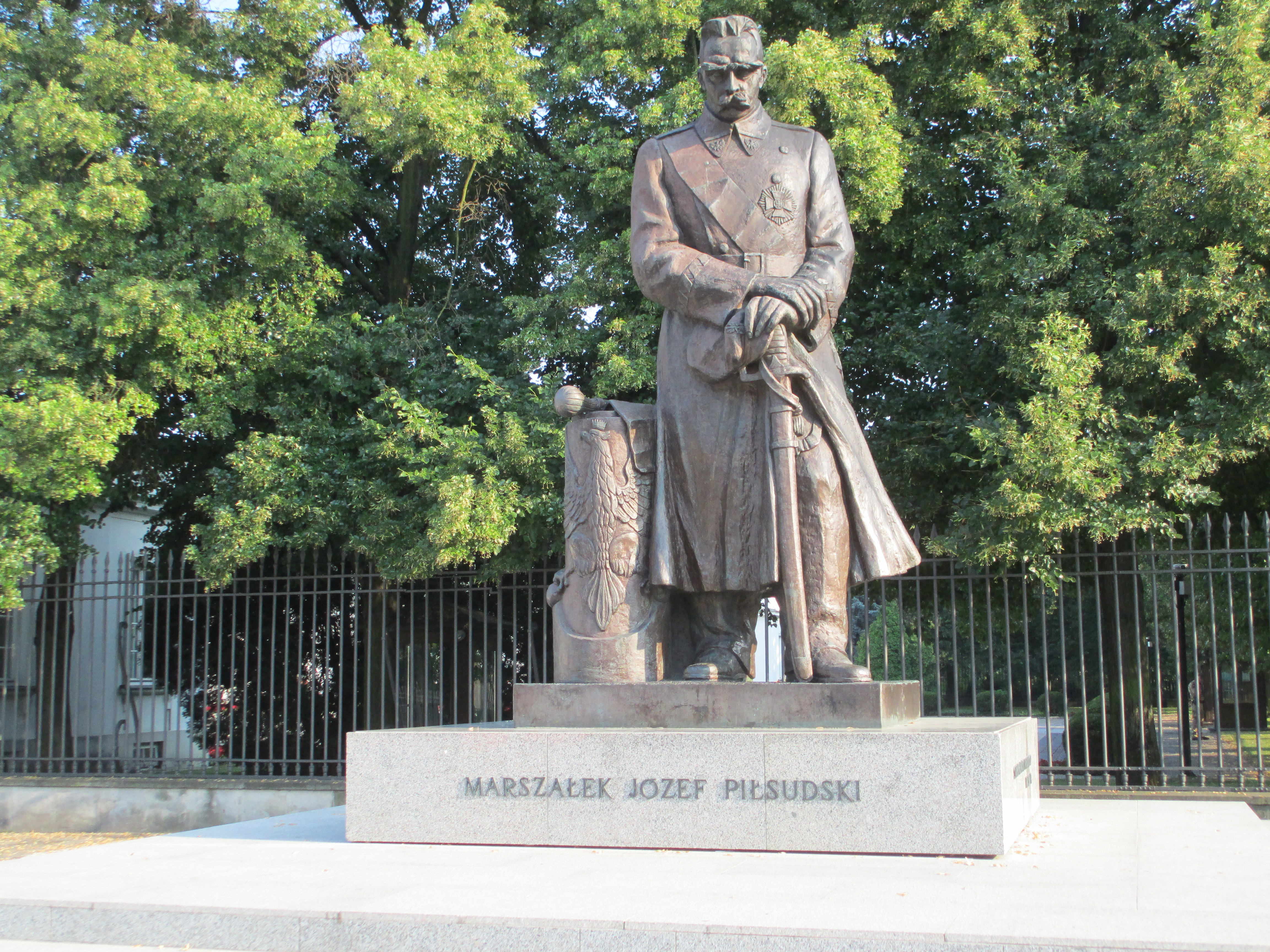 פסל של יוזף פילסודסקי בוורשה